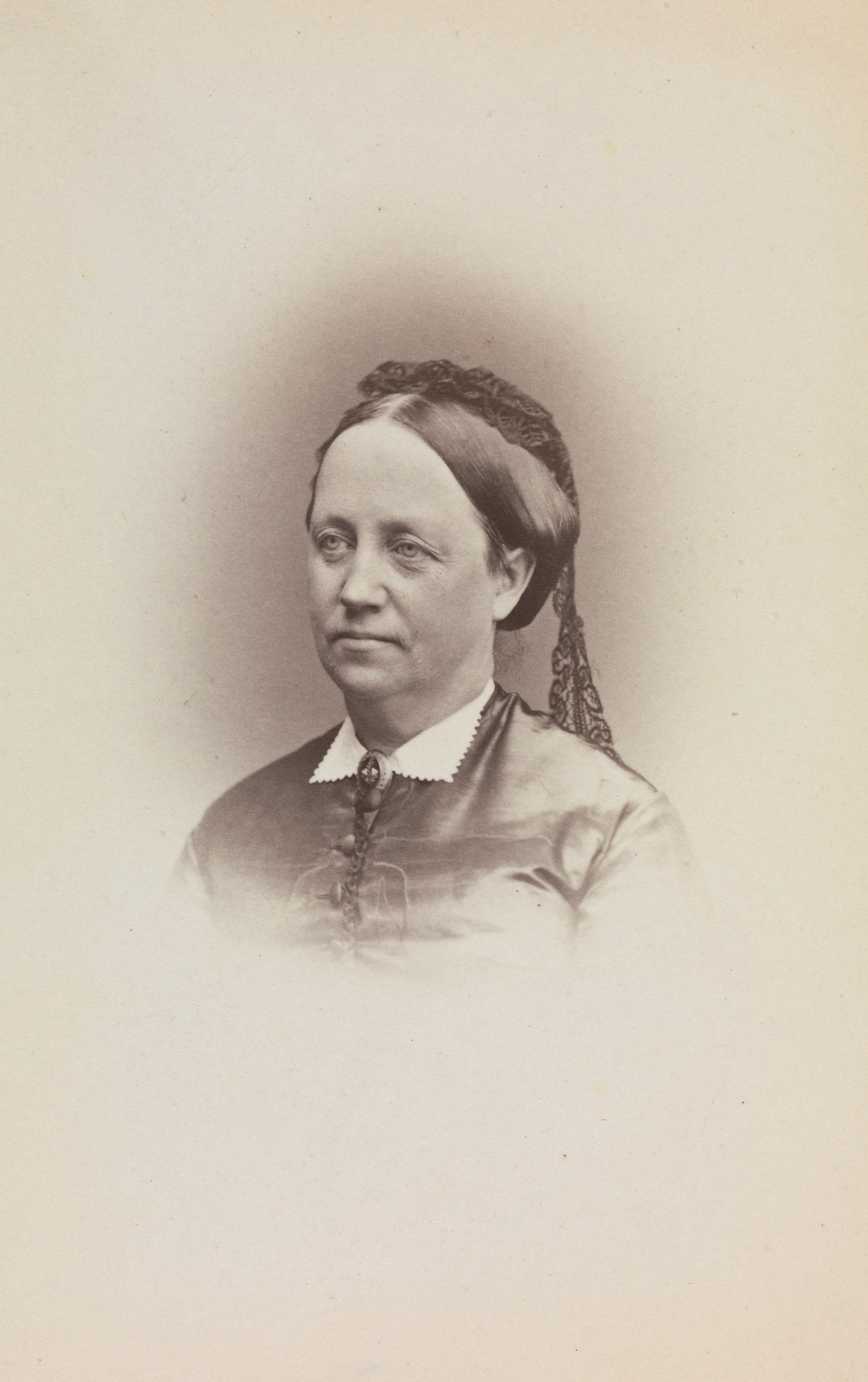 Karen Magdalena Nissen. Depicted person: Nissen, Karen Magdalena (1820-1900); født Aas Depicted place: Oslo